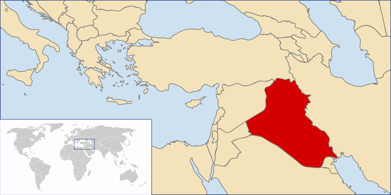 (en) World Map (pt) Mapa Mundo (de) Weltkarte (sv) Världskarta